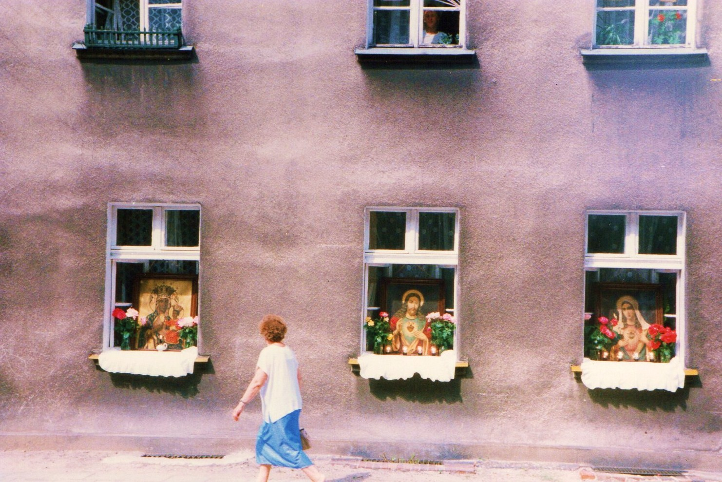 Boże Ciało na Głównej w Poznaniu - 10.6.1993r.